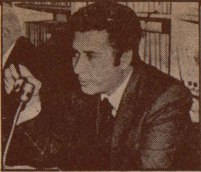 Fausto Gianfranceschi, giornalista e scrittore italiano.